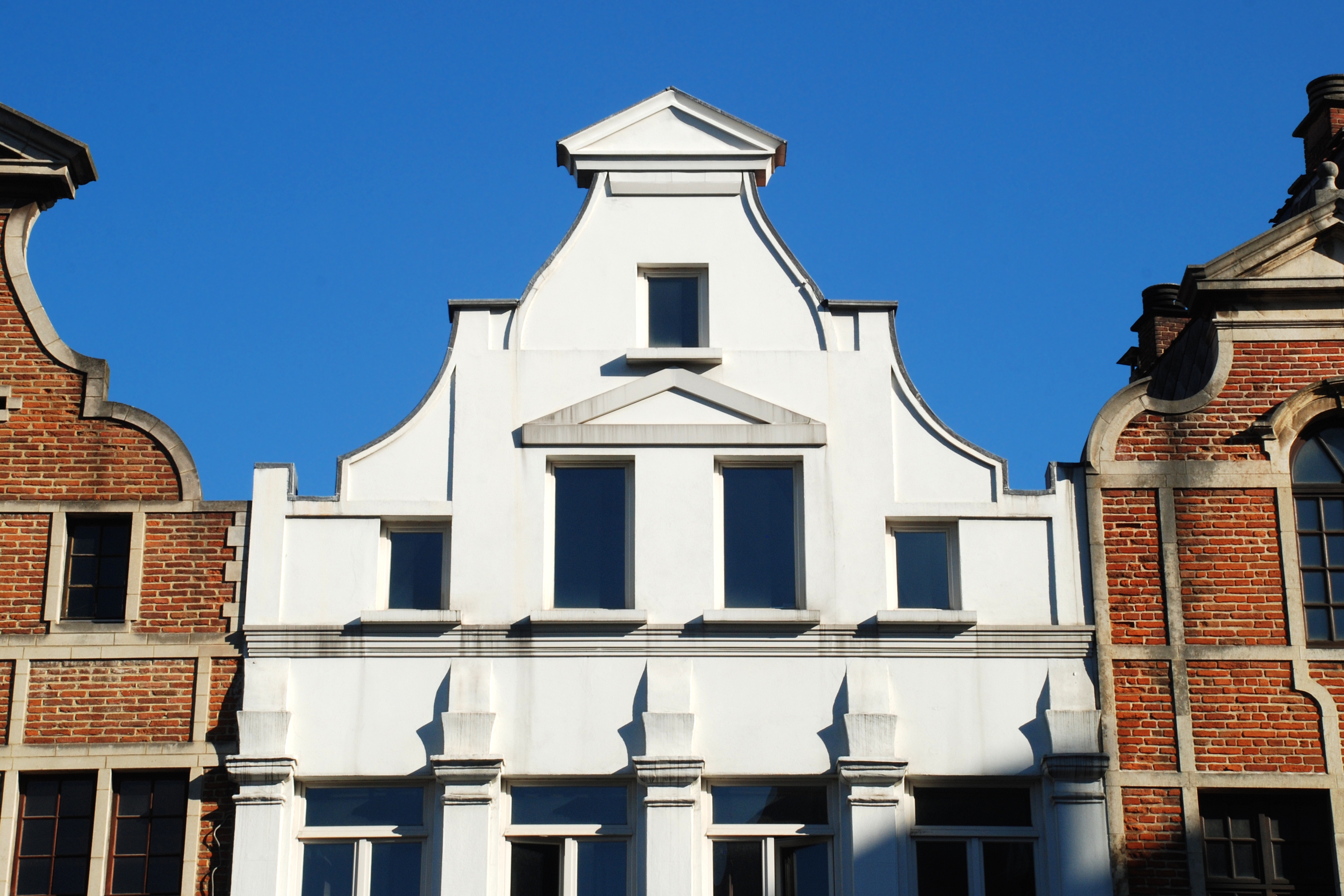 Belgique - Bruxelles - Rue de la Montagne n°14